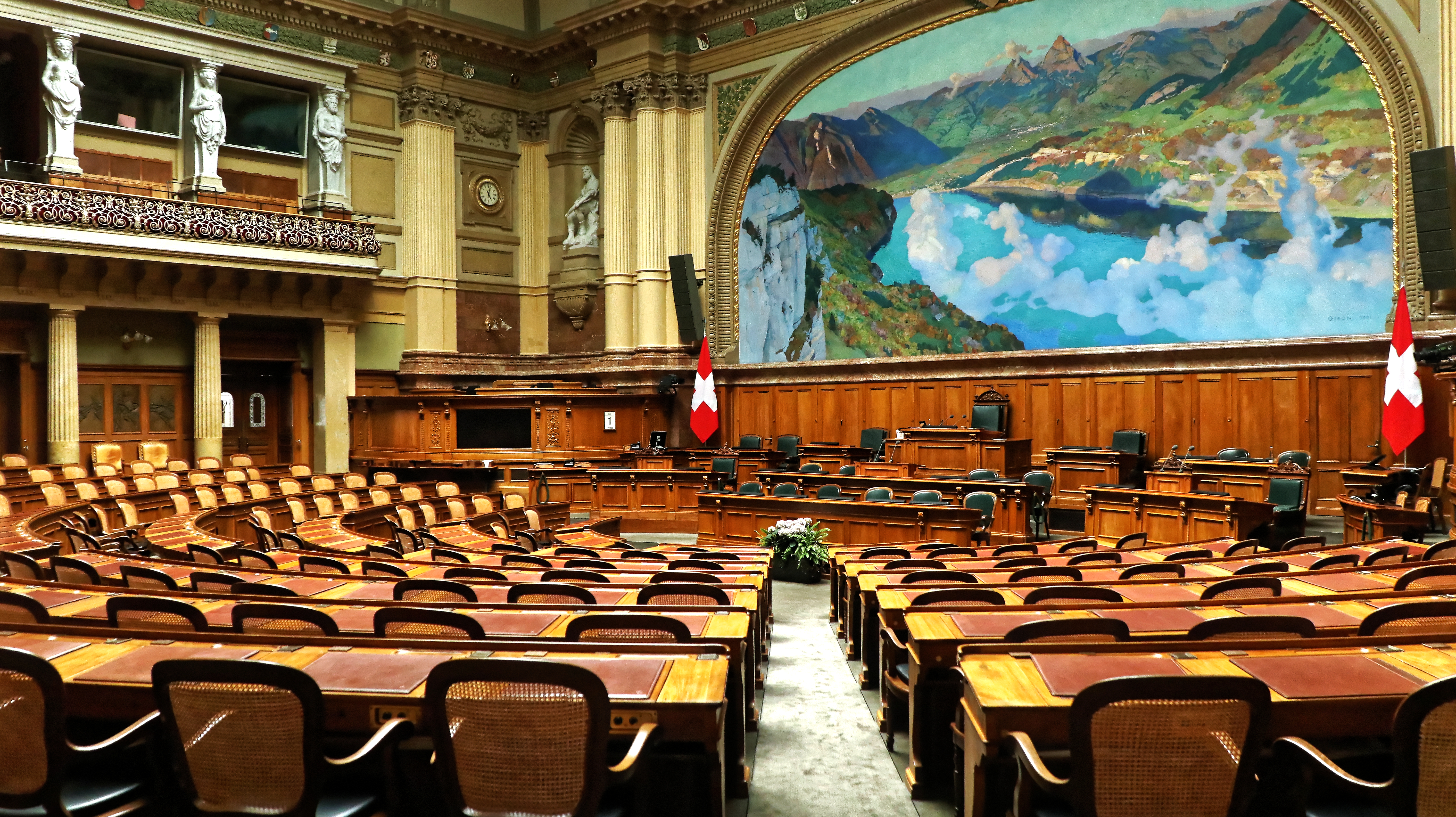 Bilder vom Besuch der Teilnehmer des WikiAlpenforums (WAF) am 2. Juni 2018 im Bundeshaus in Bern